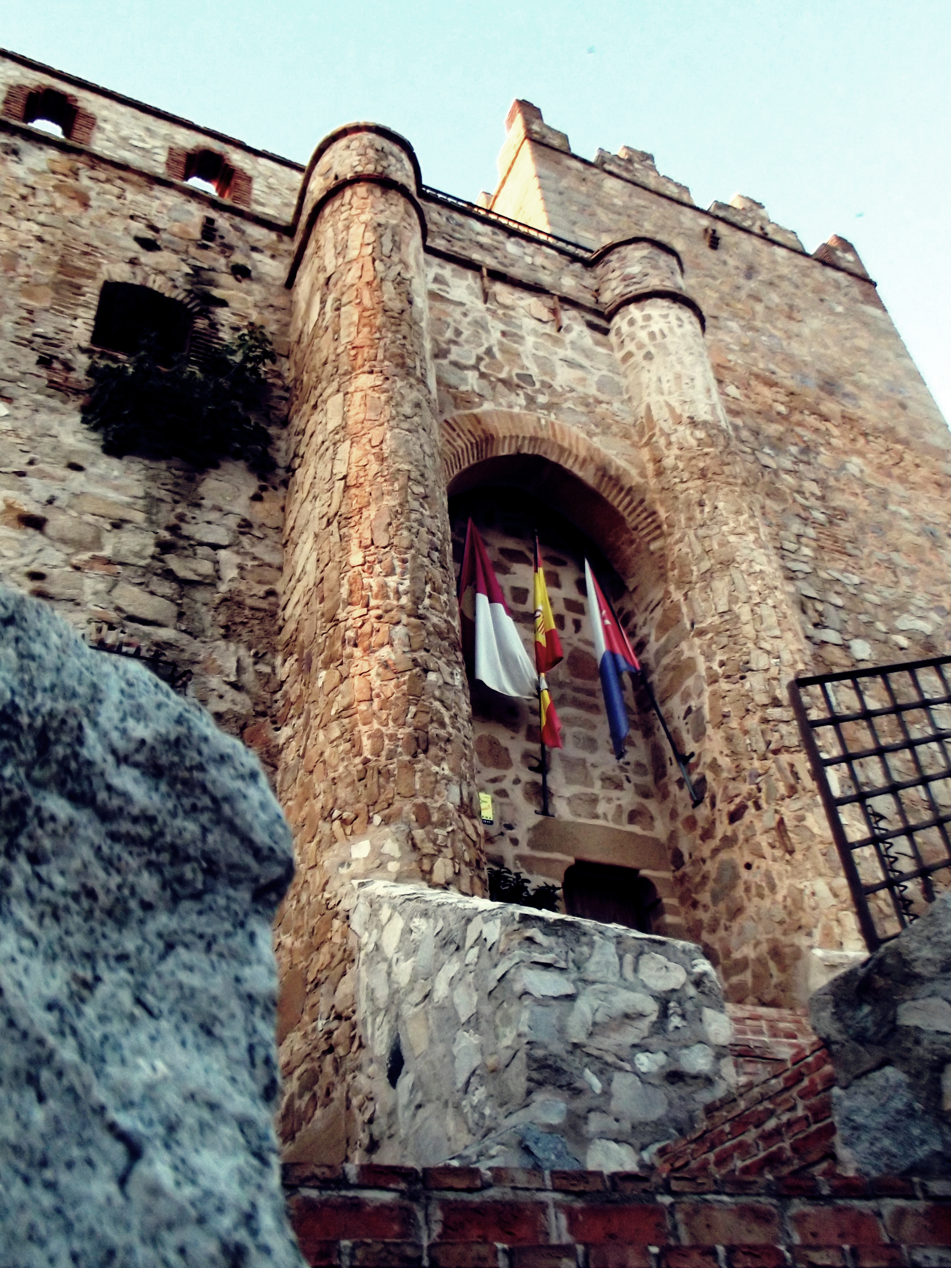 Toledo